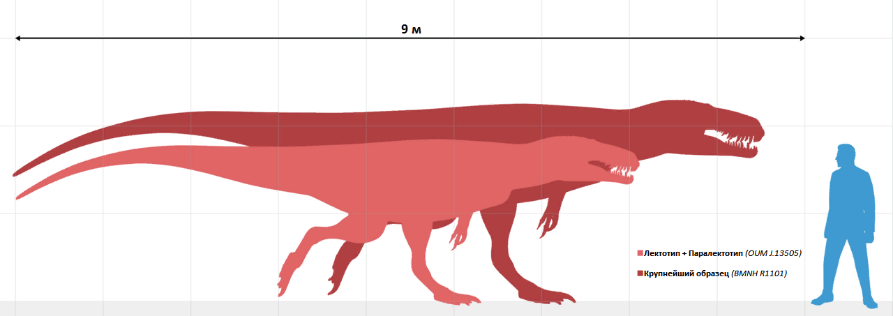 Сравнительный размер мегалозавра (Megalosaurus) согласно оценке Benson, 2010.